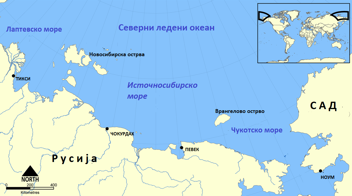 Восточно-Сибирское море на карте